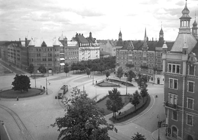 Karlaplan från Karlavägen, fotot taget 1919 ([1]).